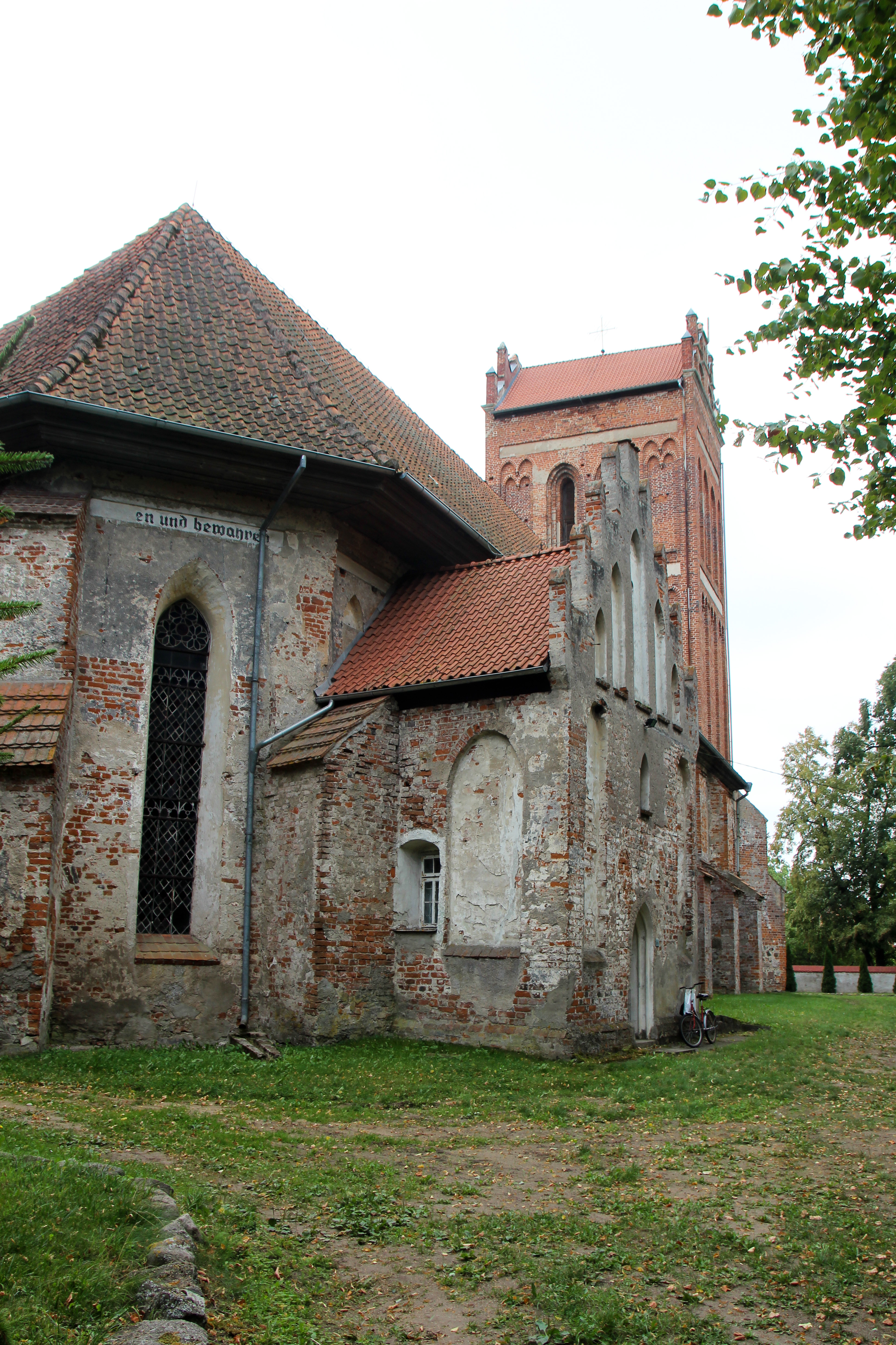 Sątoczno - wieś w Polsce położona w województwie warmińsko-mazurskim, w powiecie kętrzyńskim, w gminie Korsze.